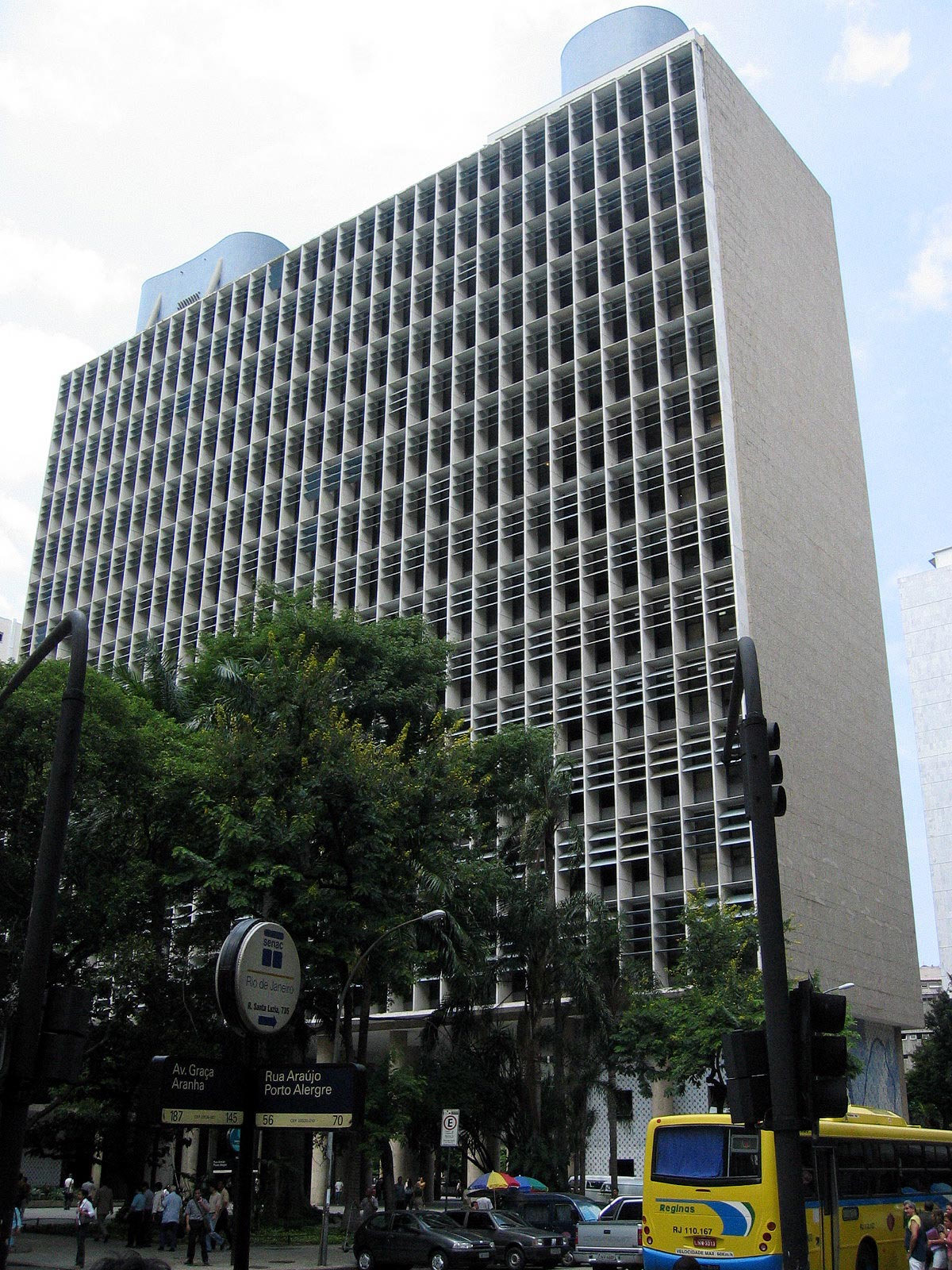 Vista norte do Edifício Gustavo Capanema.